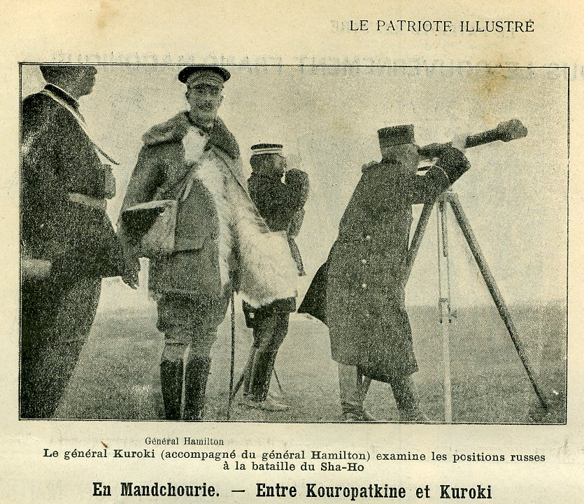 see picture